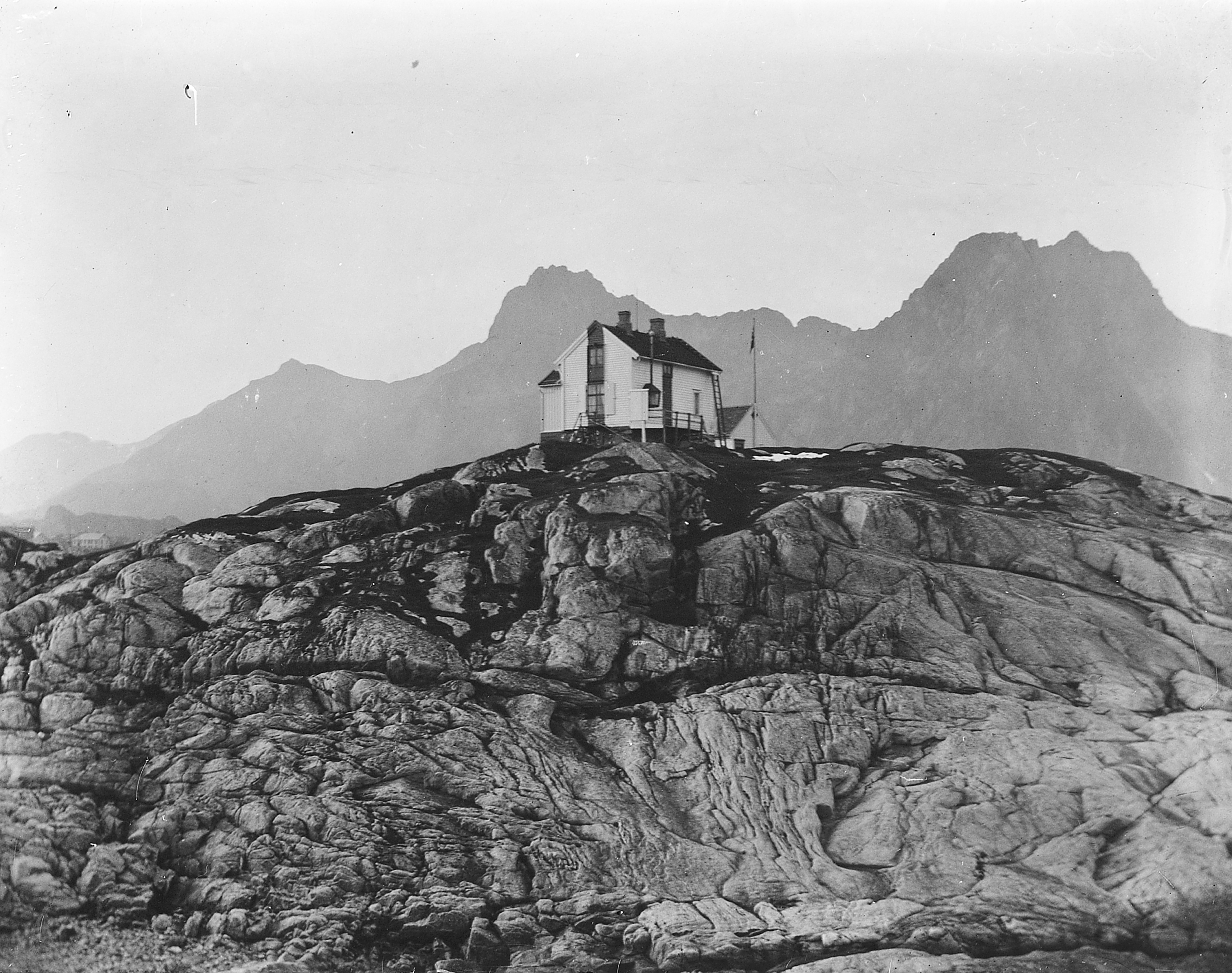 Bildet er hentet fra Arkivverket. Svolvær, Vågan Arkivinstitusjon : Riksarkivet Arkivnavn : Fyrdirektoratet Sted : Norge, Nordland, Vågan, Svolvær Emneord: Fyr, Kyst Avbildet